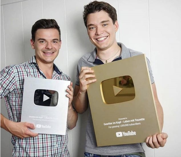 Jan Zimmermann (links) und Tim Lehmann (rechts) mit den YouTube-Auszeichnungen Silberner Play-Button für 100.000 Abonnenten und Goldener Play-Button für 1.000.000 Abonnenten